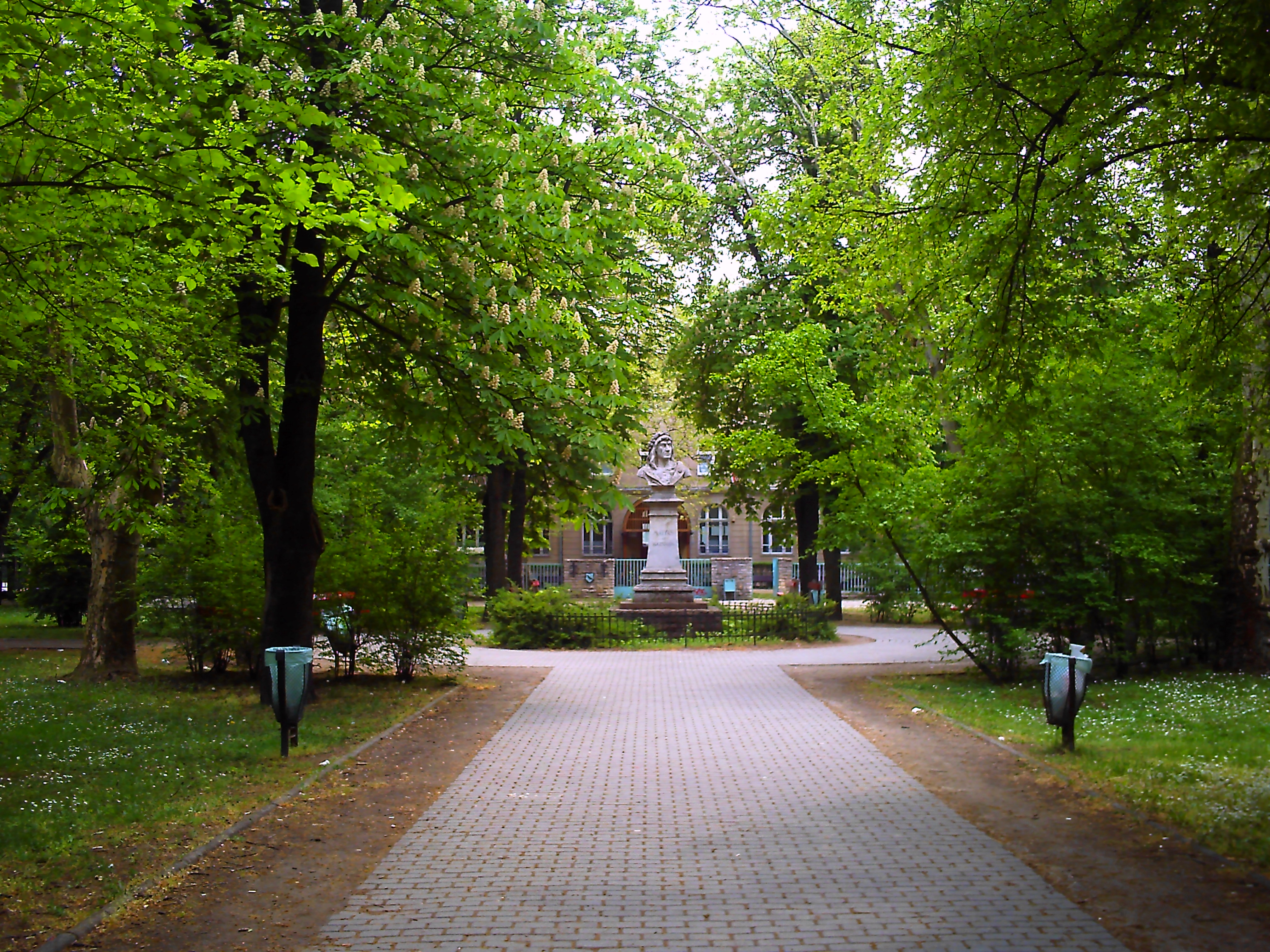 Mátyás király tér, Budapest XVI. kerületében, Mátyásföldön, középen Mátyás király mellszobrával